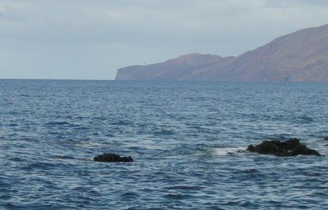 Mar de las Calmas (El Hierro, Canarias-España )